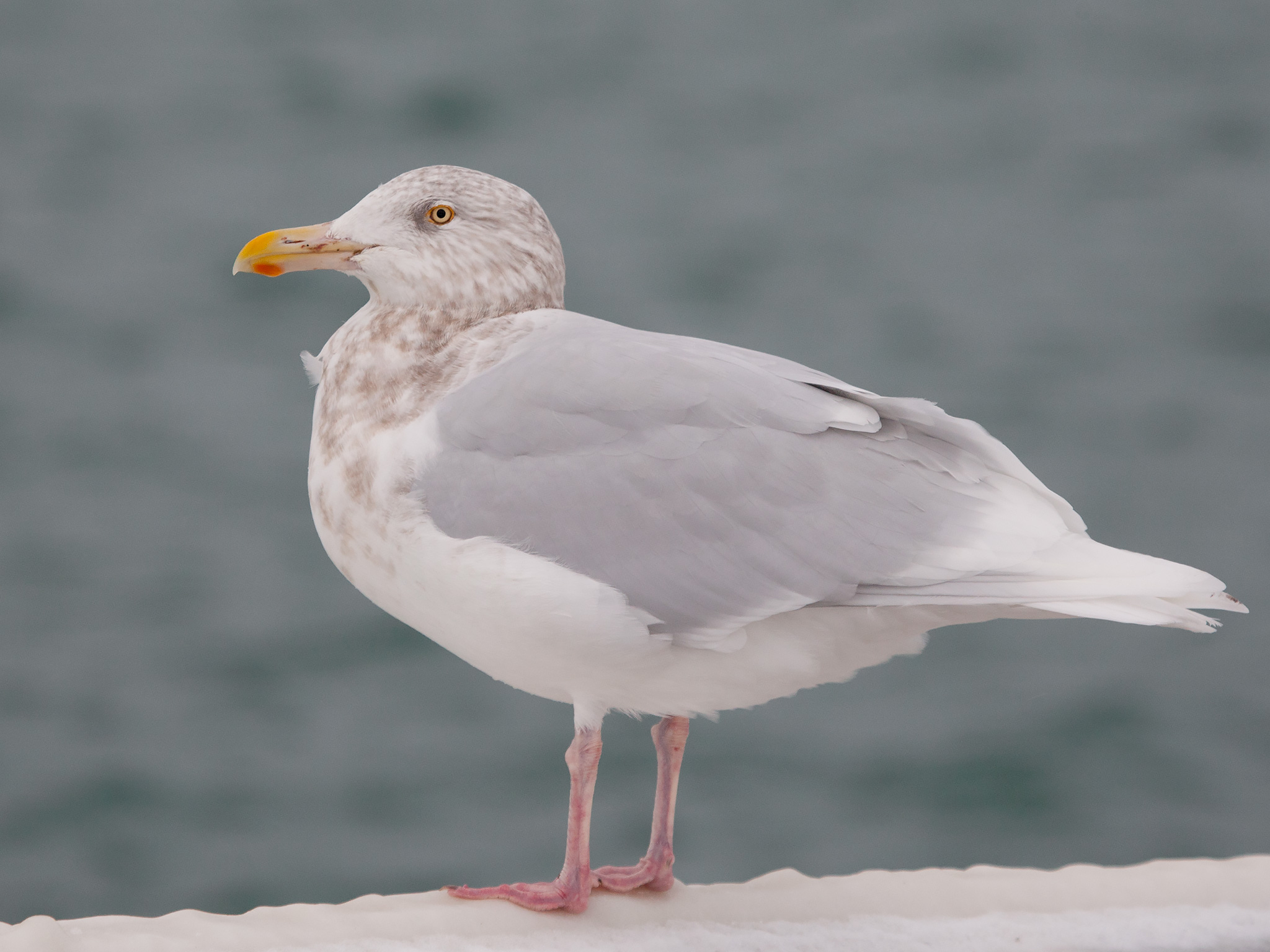 シロカモメ。撮影地：北海道